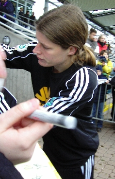 Kerstin Garefrekes, 1.FFC vs. Crailsheim 18.11.2007